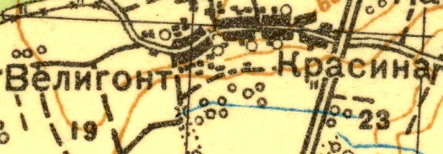 Топографическая карта Ленинградской области, квадрат О-35-12-Г (Ропша), деревня Велигонты